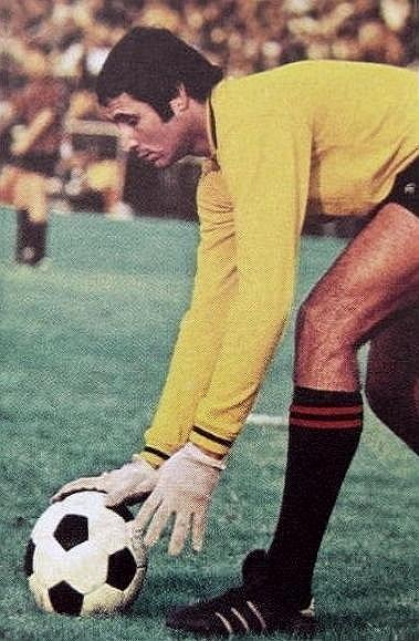 Dominique Baratelli en 1971 (OGC Nice), 'Ageducatifs Football 1971 - 1972', Panini figurina.